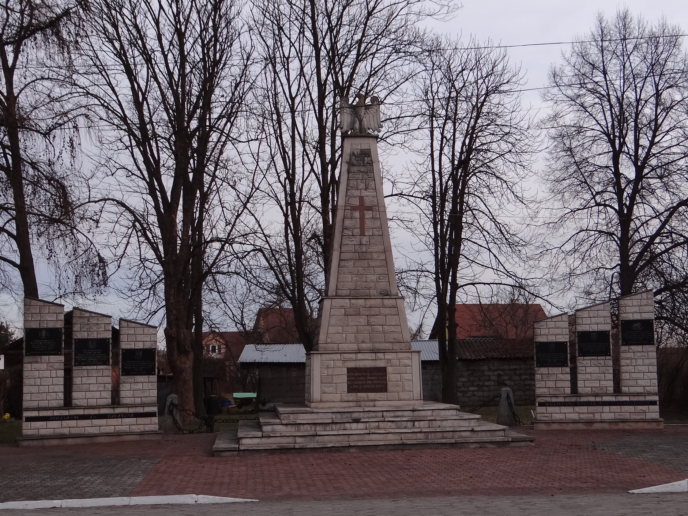 Pomnik zamordowanych żołnierzy polskich w Szczucinie